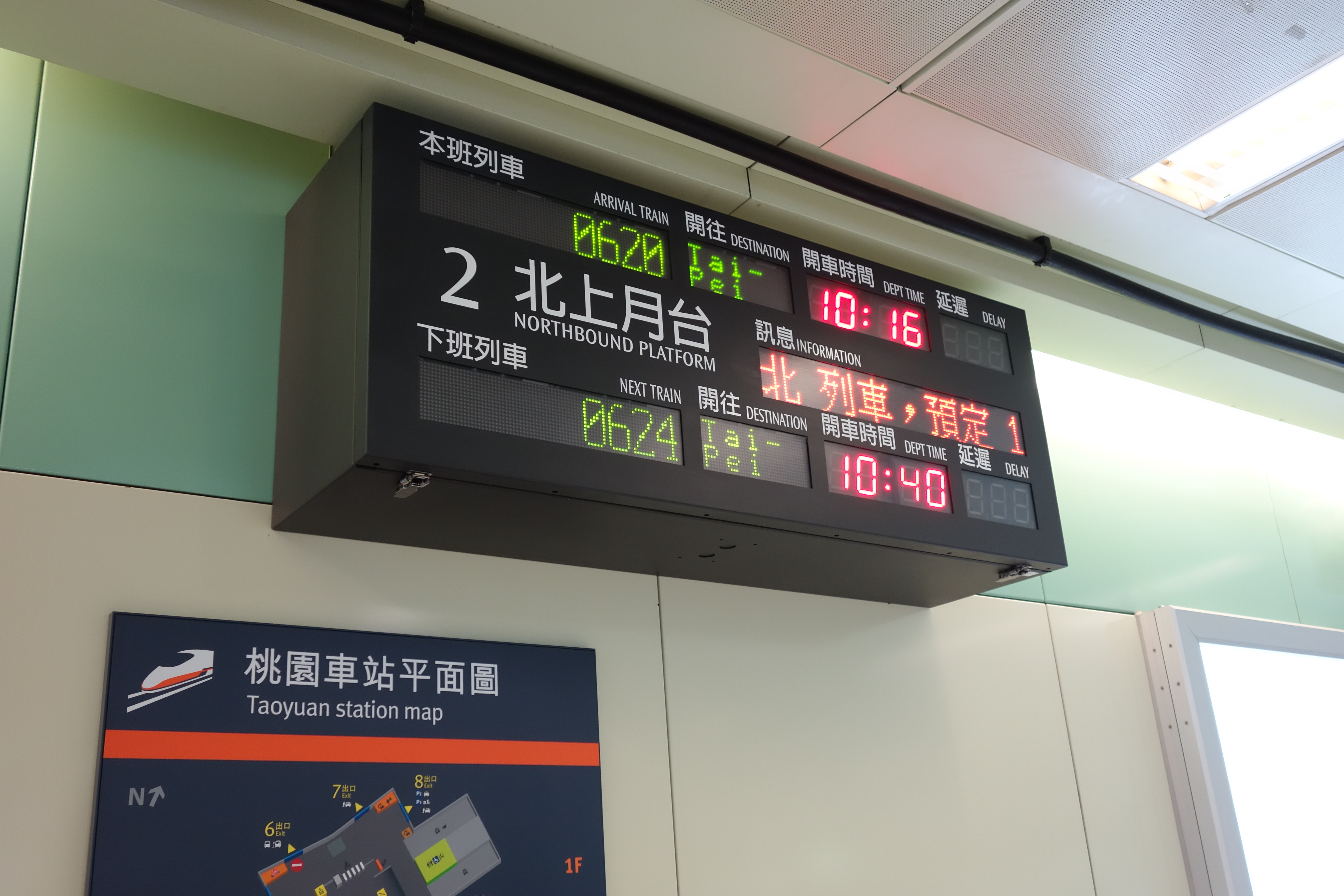 発車案内（台湾高鐵・桃園駅）